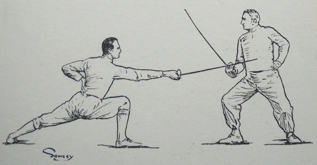 László Gerentsér (1873-1942), Hungarian fencing master and writer; Aladár Gerevich (left), László Gerentsér (right).